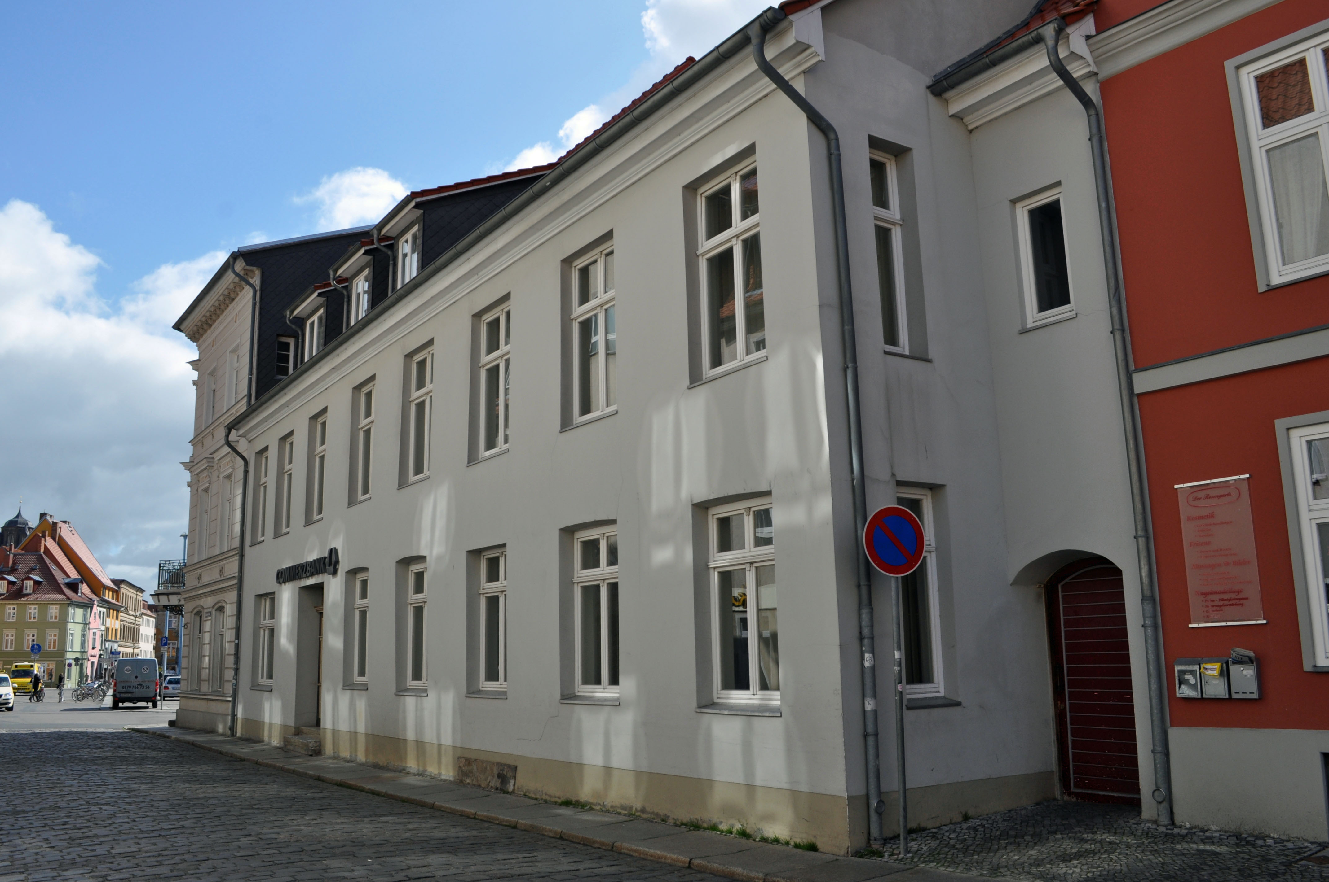 Gebäude in Stralsund, siehe Dateiname